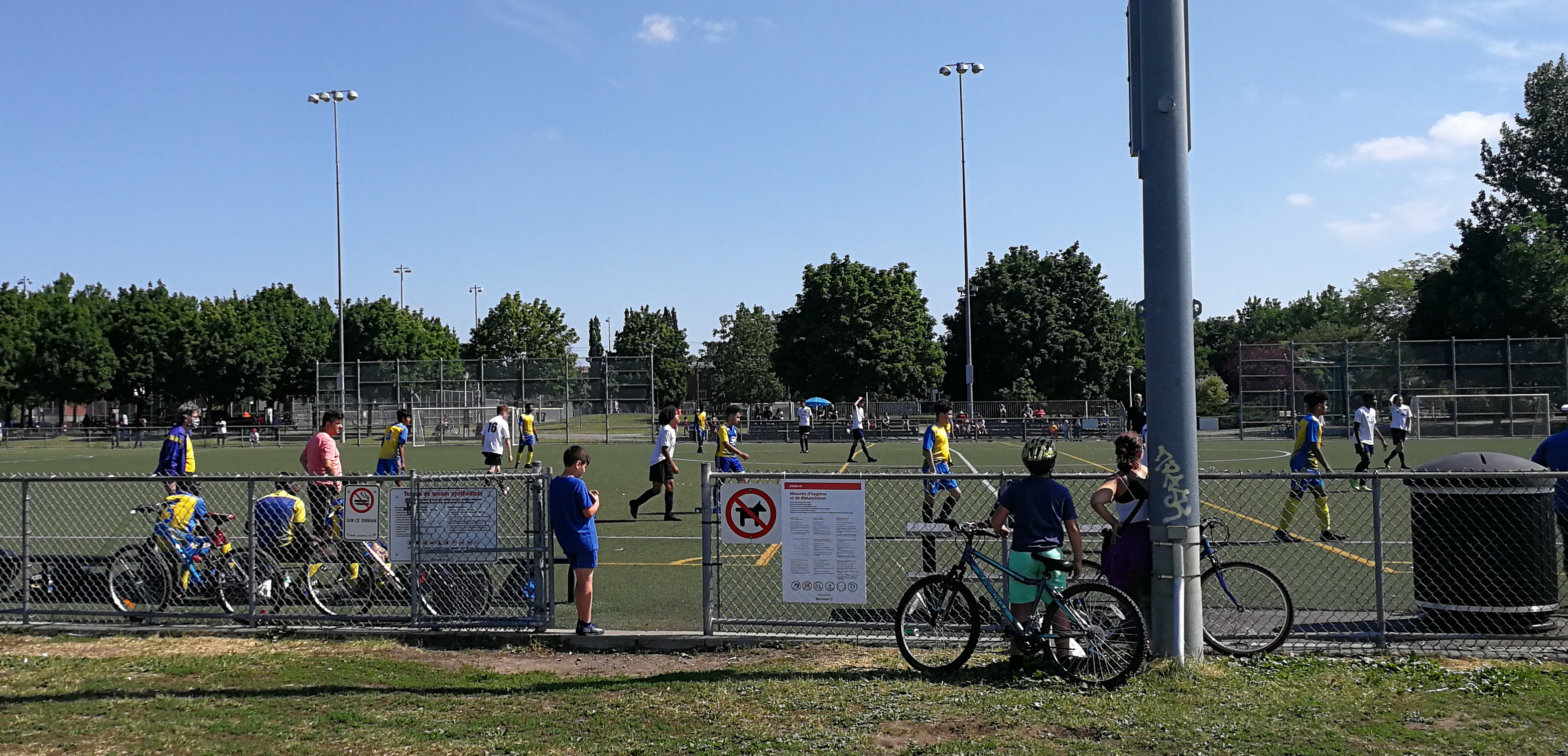 Match de soccer survenant dans les premiers jours après que ce soit permis au Québec par les autorités, suite à la Pandémie de Covid-19 au Québec